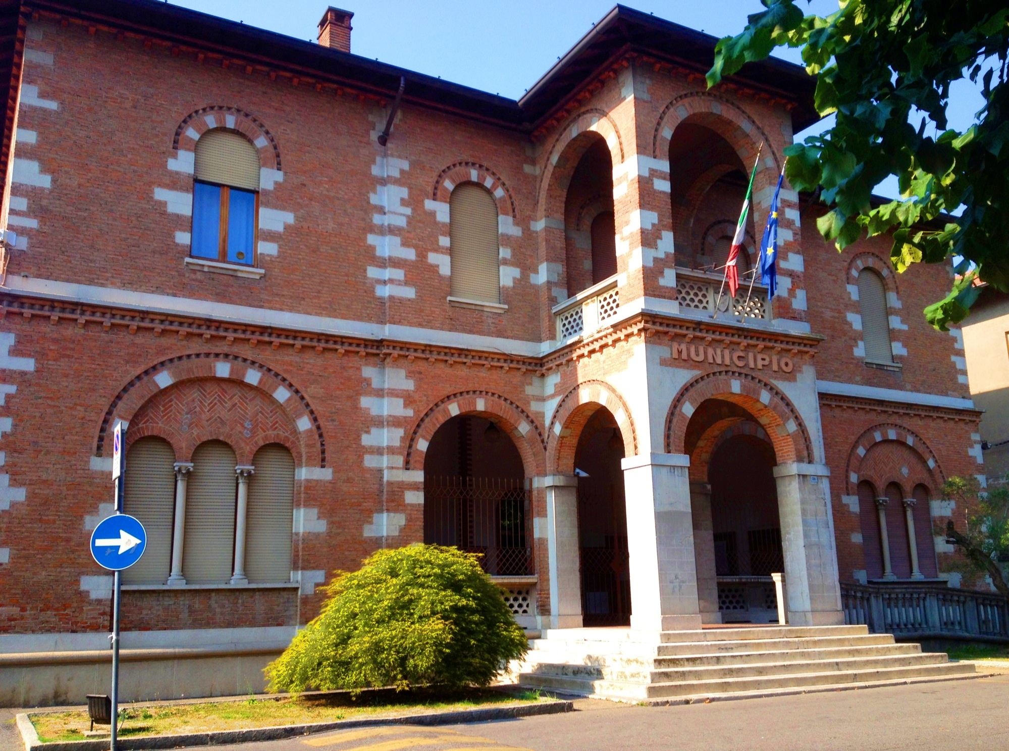 Il municipio di Paullo.